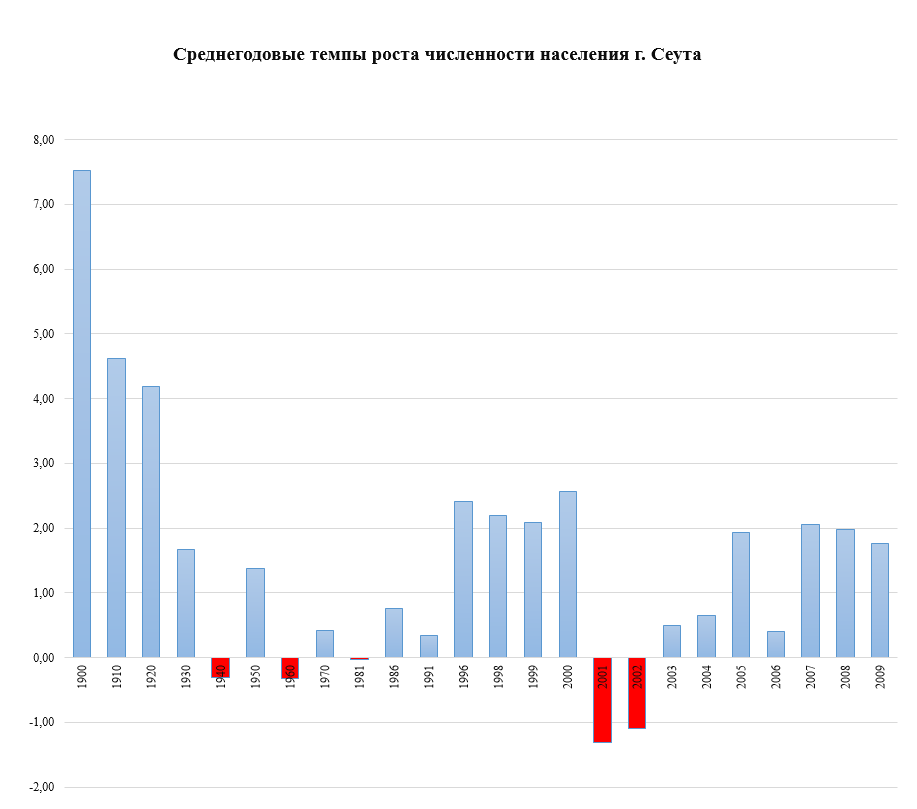 Среднегодовые темпы роста численности населения г. Сеута 1910-2010